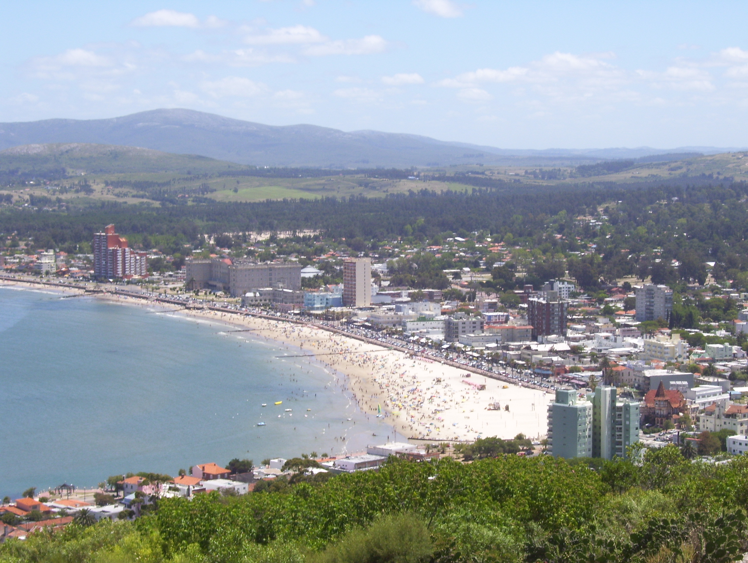 Vista general de la ciudad de Piriápolis desde el Cerro San Antonio